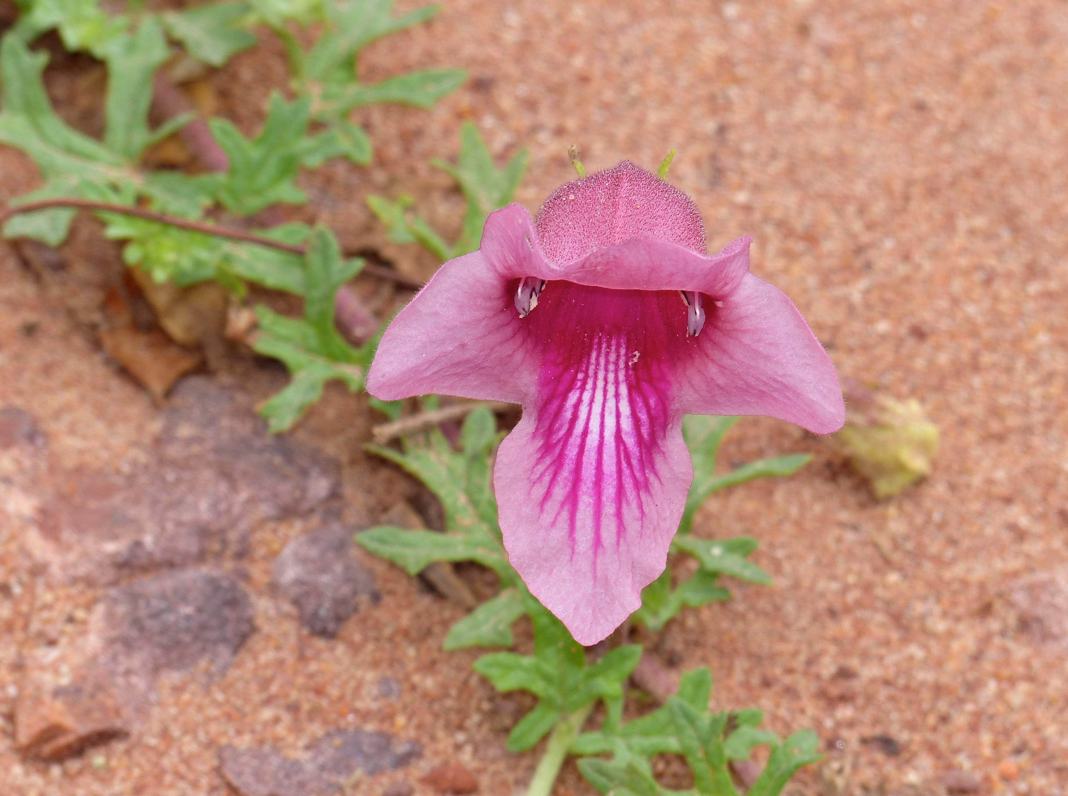 Mahonie Loop near Punda Maria, Kruger NP, SOUTH AFRICA